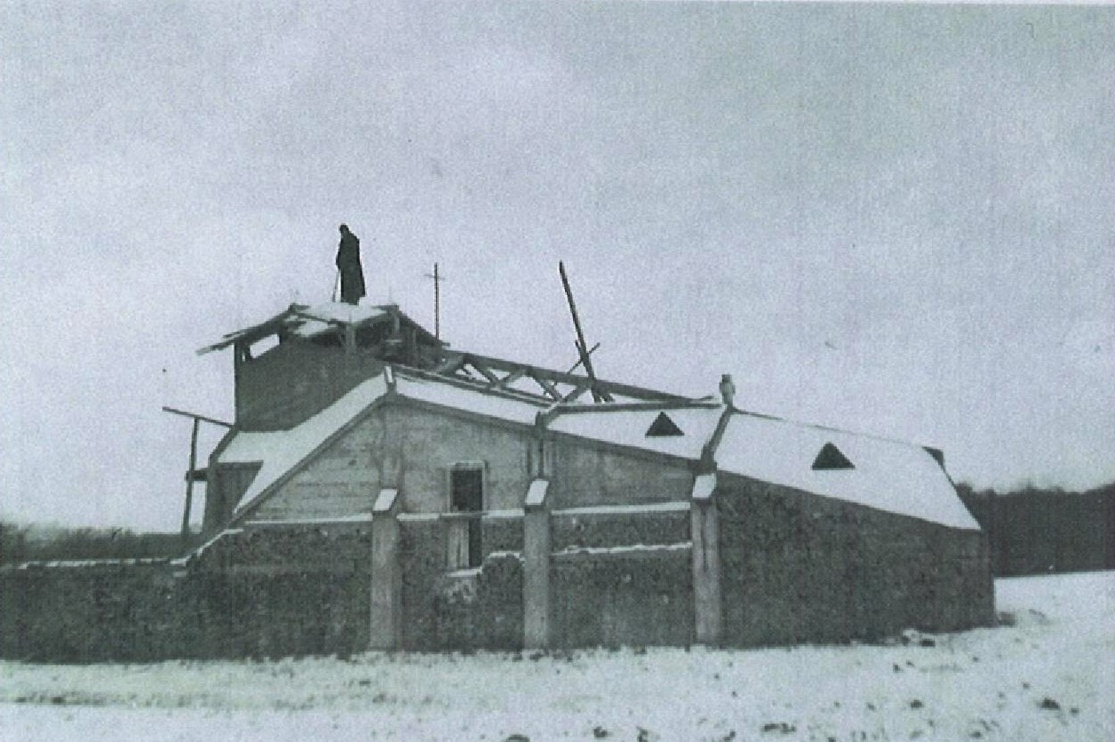 О. Евфимий на крыше церкви во время постройки